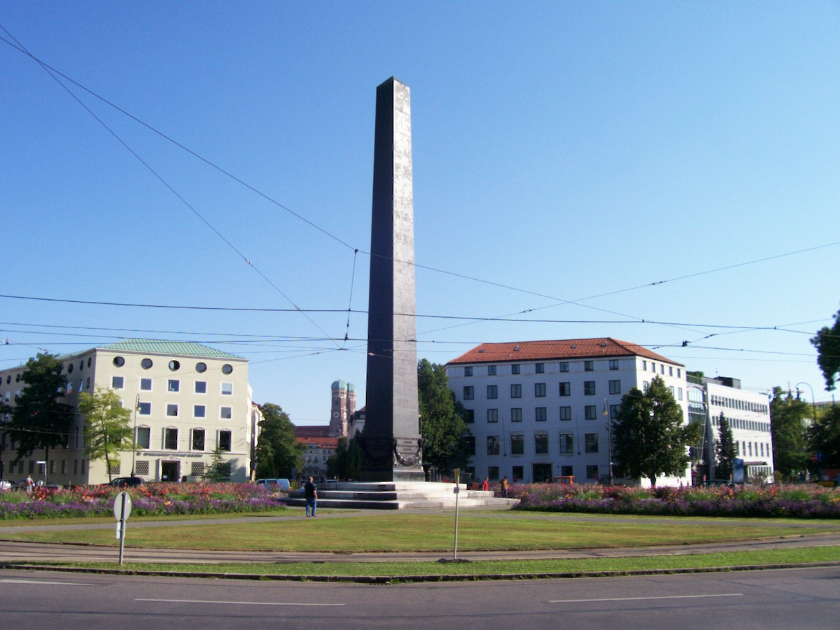 Karolinenplatz in Munich (Bavaria)